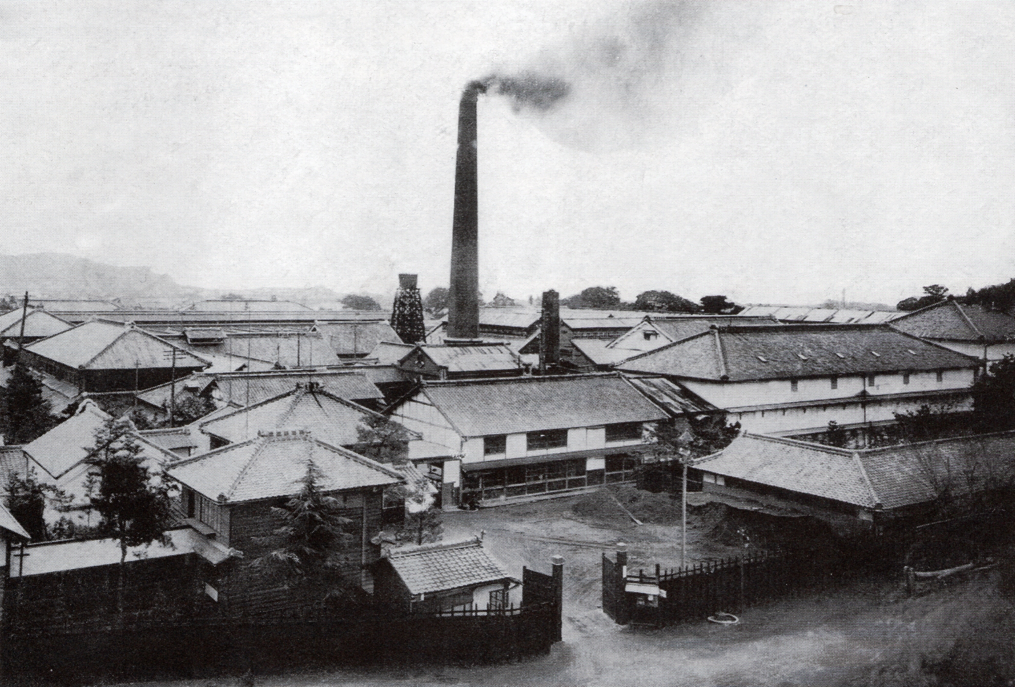 三龍社（岡崎市上六名町）。1928年頃。